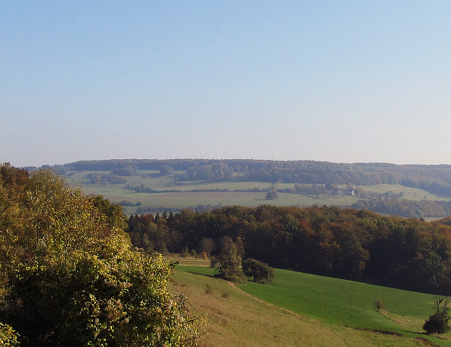 Der Kahlenberg bei Breitfurt mit dem Kirchheimer Hof vom Hang des Kalbenbergs aus gesehen.